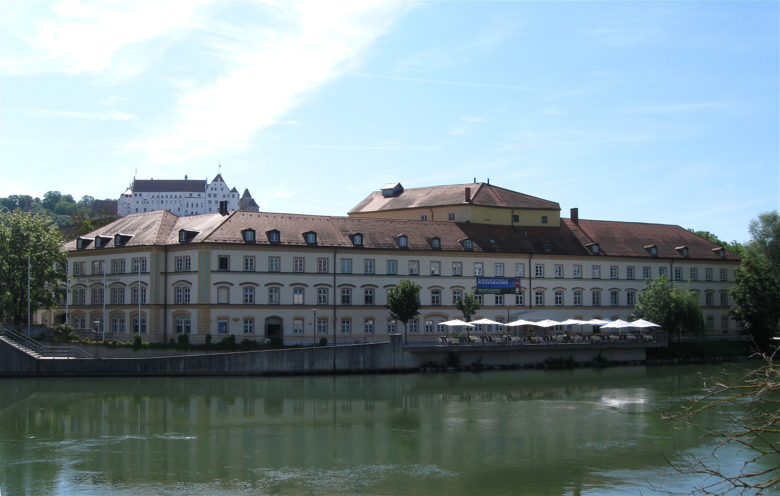 Ländtorplatz 2, 3, 4, 5; Gaststätte Bernlochner, umfangreicher größtenteils dreigeschossiger Gebäudekomplex mit spätklassizistischem Theater, 1841 von Johann Bernlochner